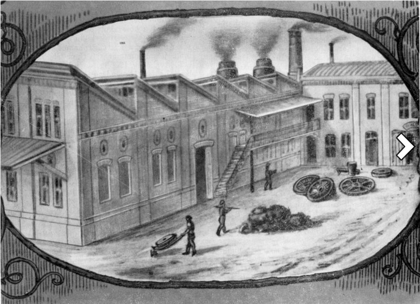 Az Első Magyar Vagongyár Rt. telepe, melyet a „Ganz és Társa Vasöntő és Gépgyár Rt." 1880-ban felvásárolt.